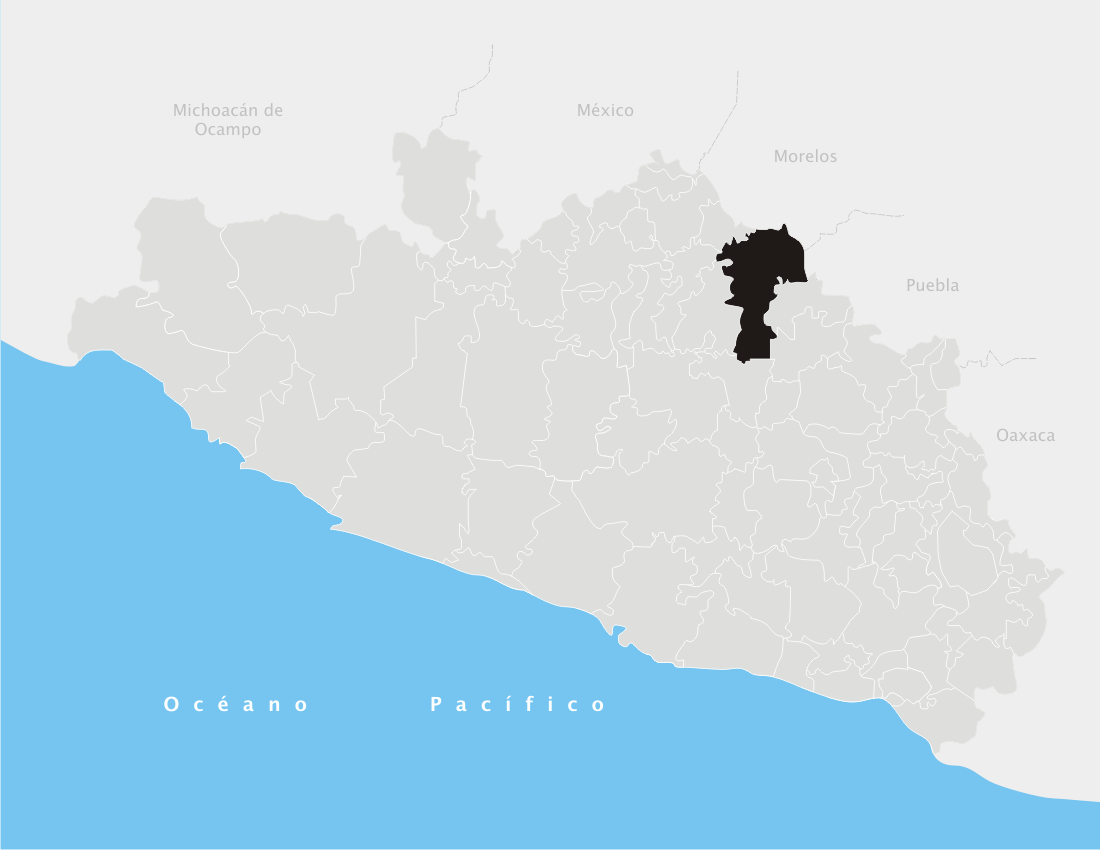 Huitzuco de los Figueroa en el estado de Guerrero (México)